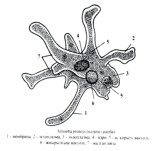 Саркодиналар